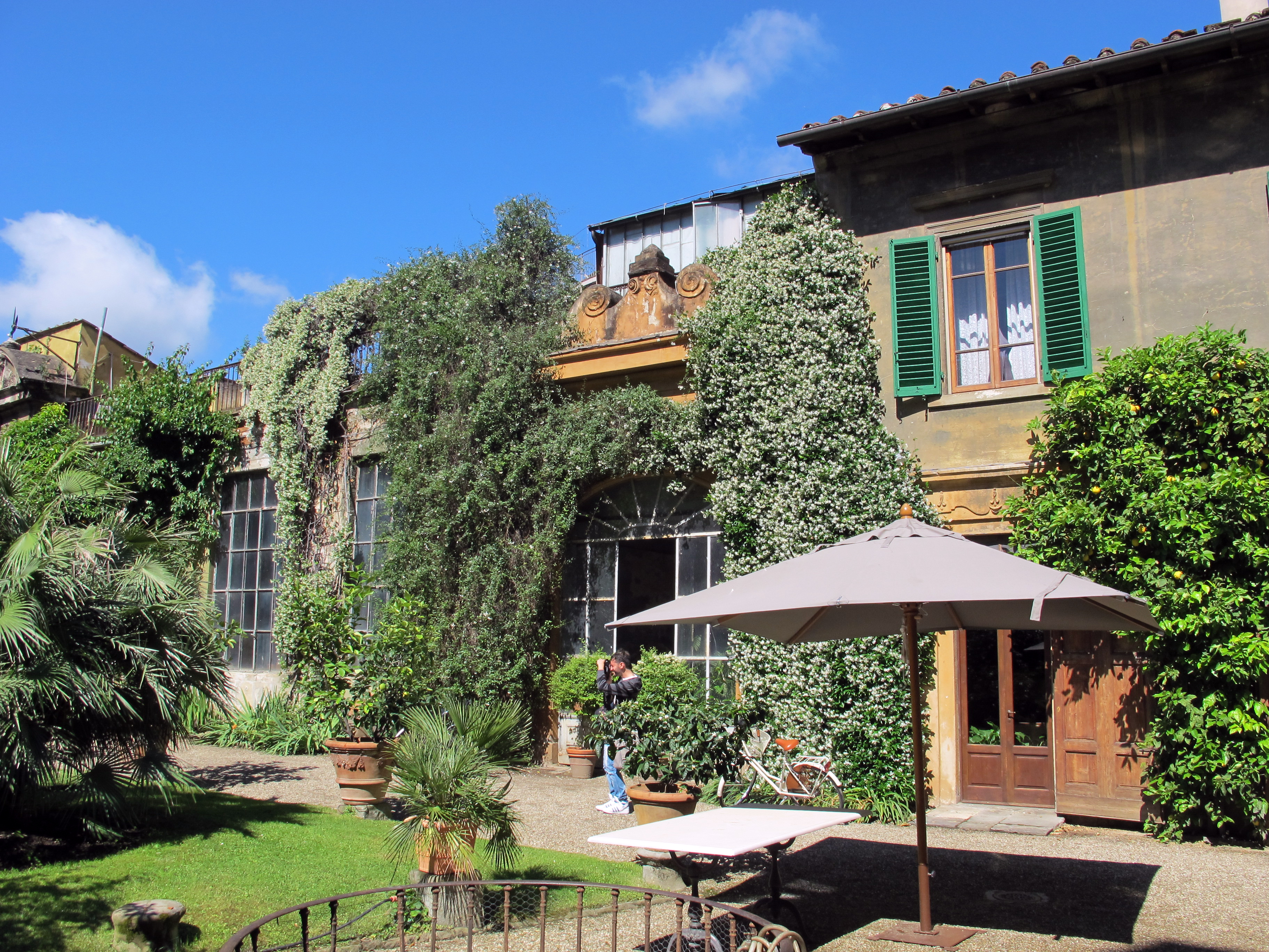 Palazzo budini gattai, giardino, veduta